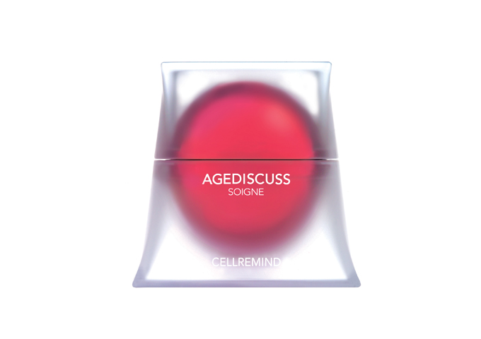 CELLREMIND